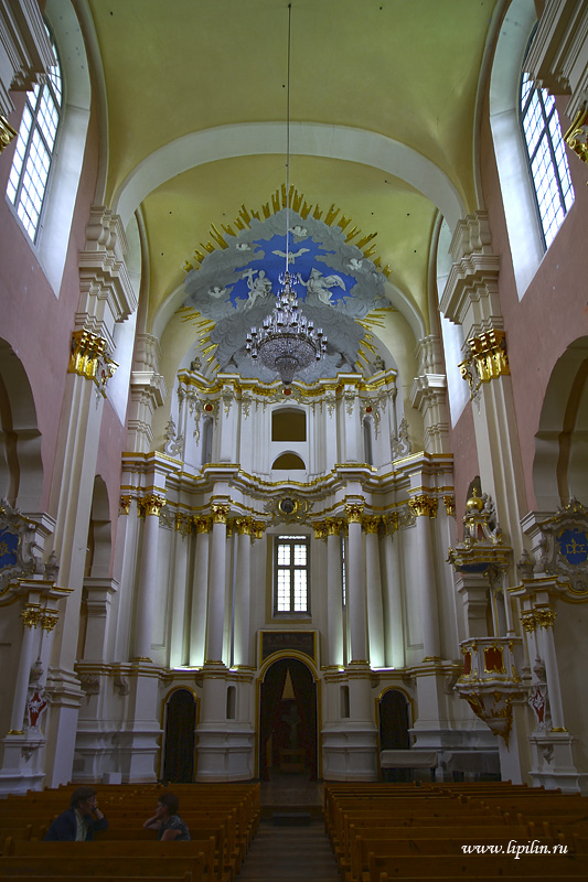 Полацк. Інтэр'ер сабора